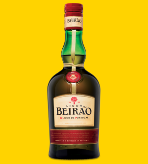 Licor-Beirão-&-Orus